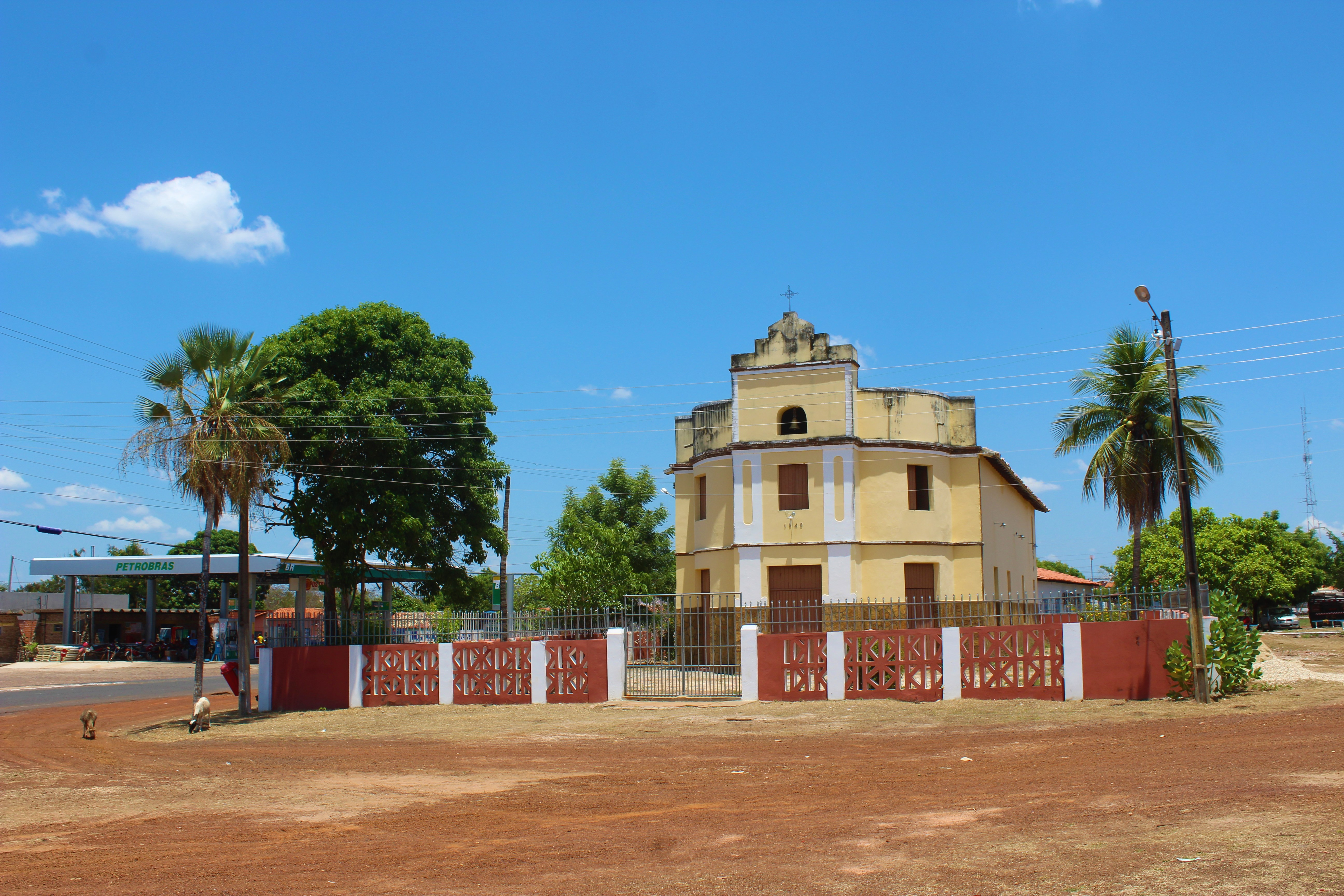 Capelinha histórica de Cabeceiras do Piauí.